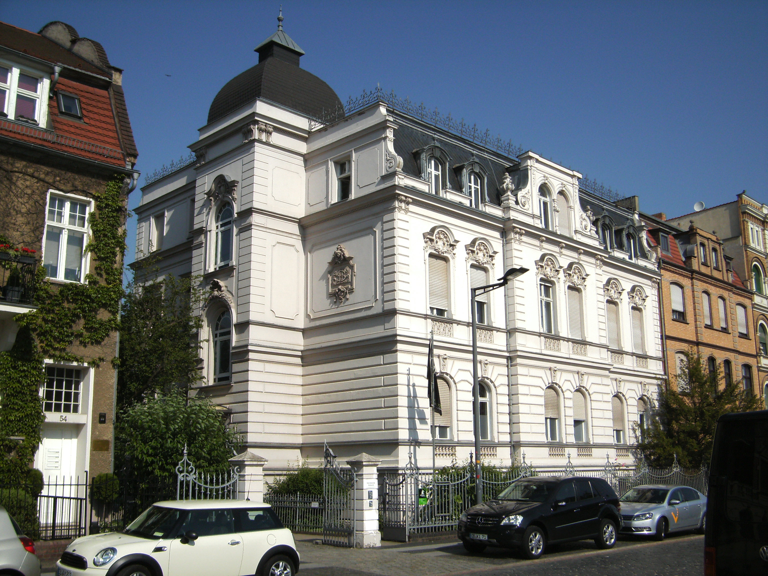 Schillerstraße 55 ,2